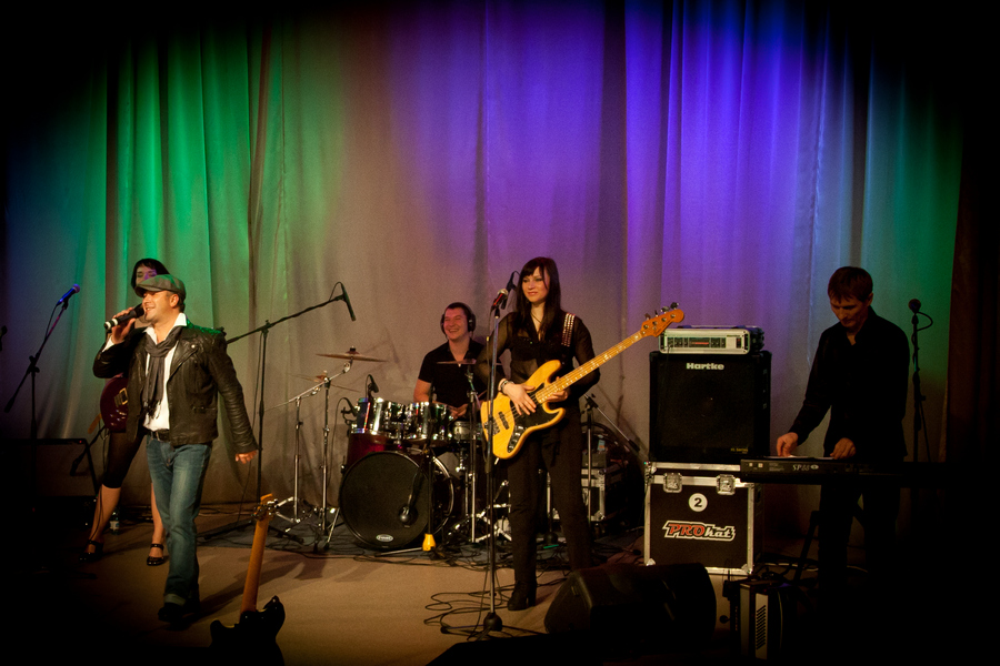 Виктор Петлюра; концерт в МАУ «Центр культуры и общественных мероприятий» организованный концертным агентством «Северяночка»